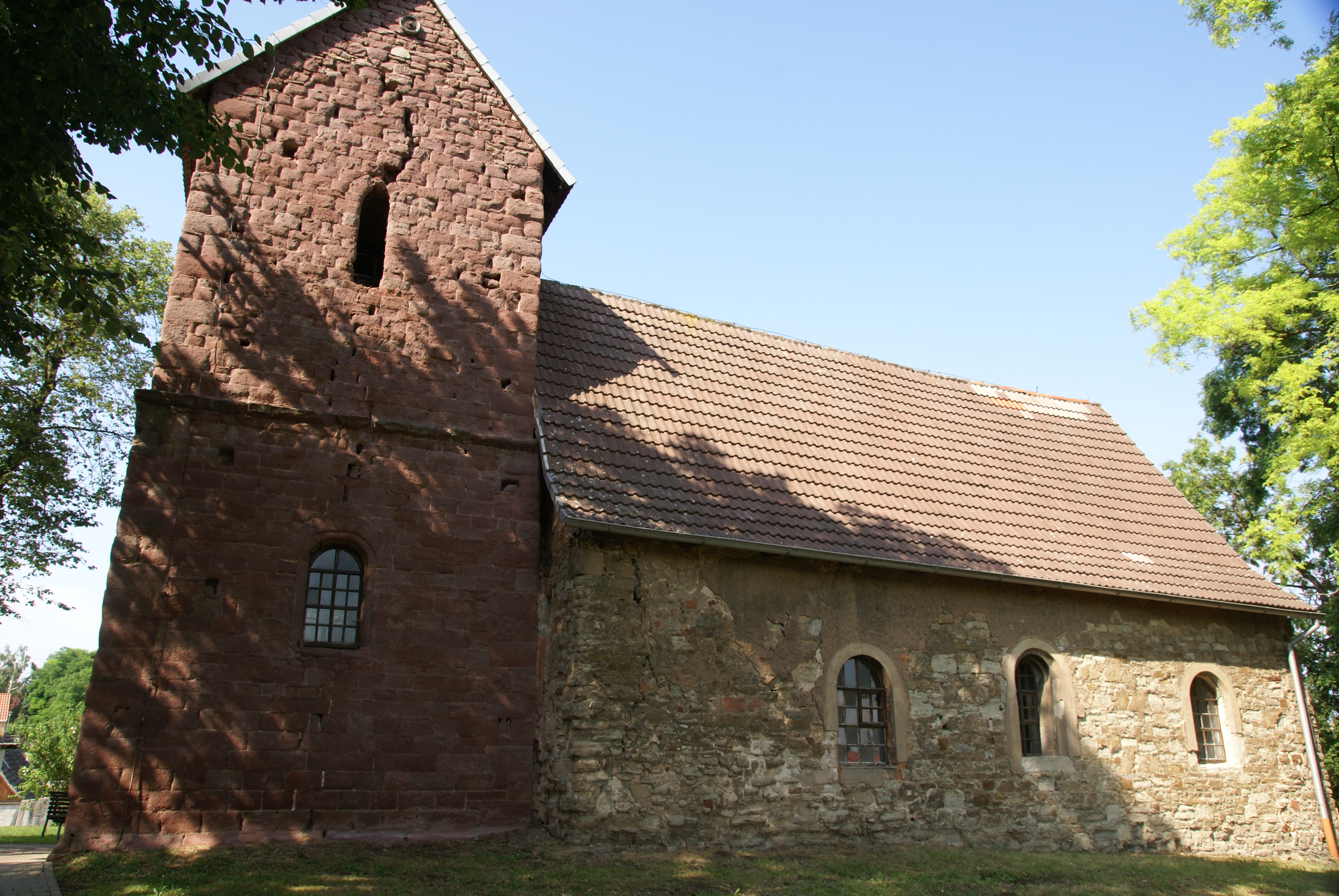 Ansicht der Kirche St. Stephan in Ihlewitz von Süden